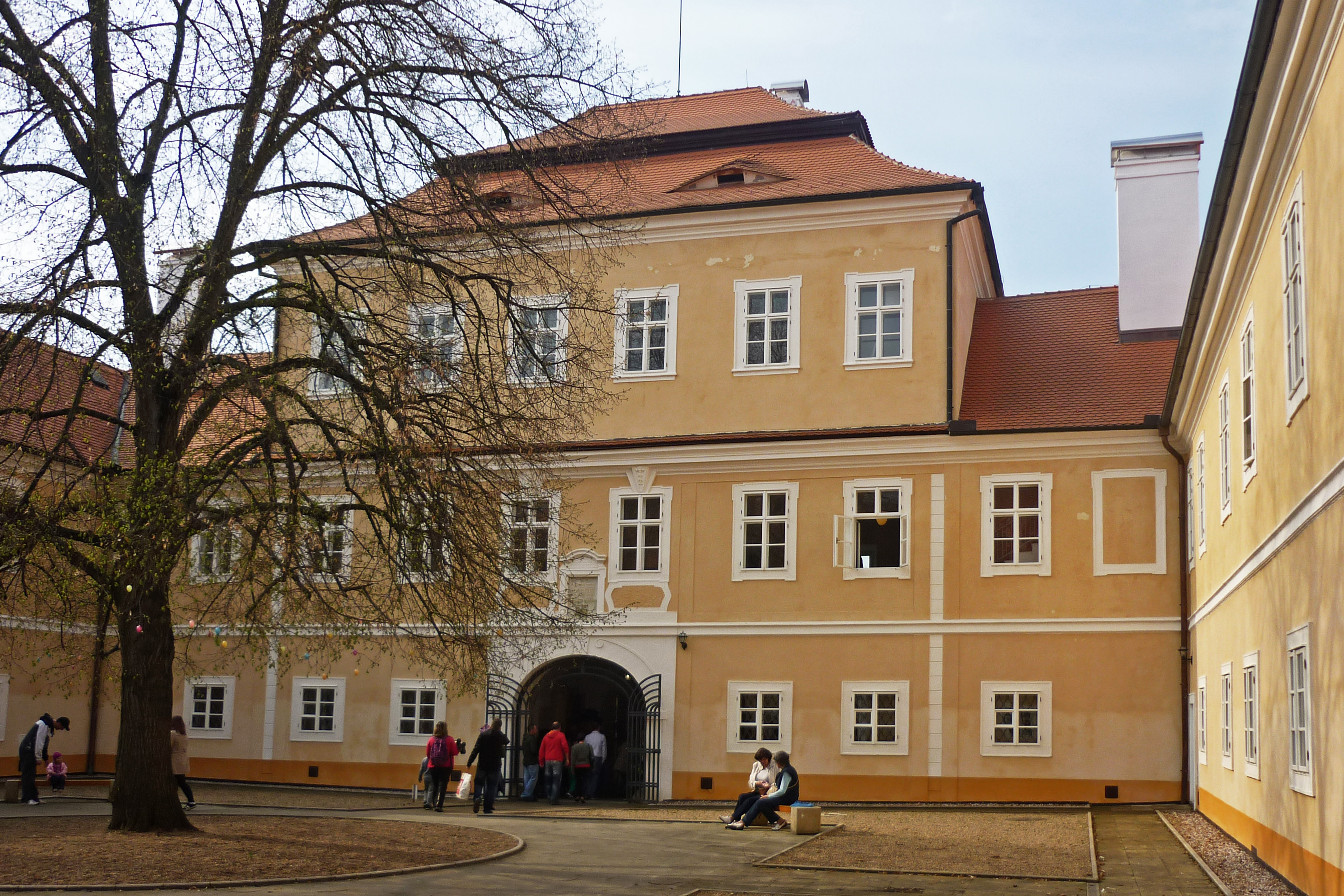 Innenhof im Waldstein-Schloss in Oberleutensdorf (Litvínov)